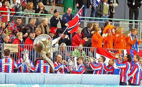 Kleintje Pils in actie